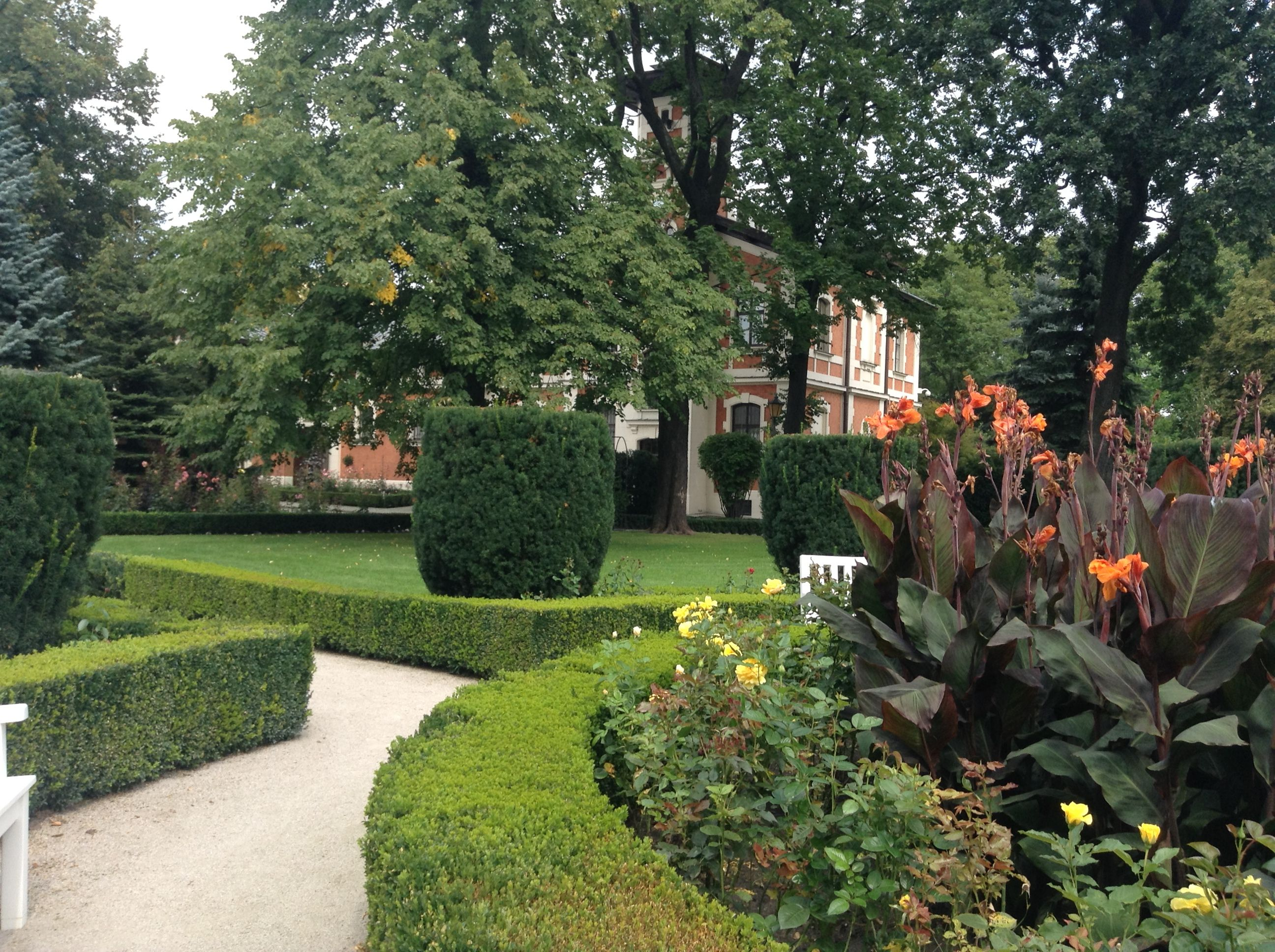 Widok ogrodu w Pałacu Herbsta w Łodzi